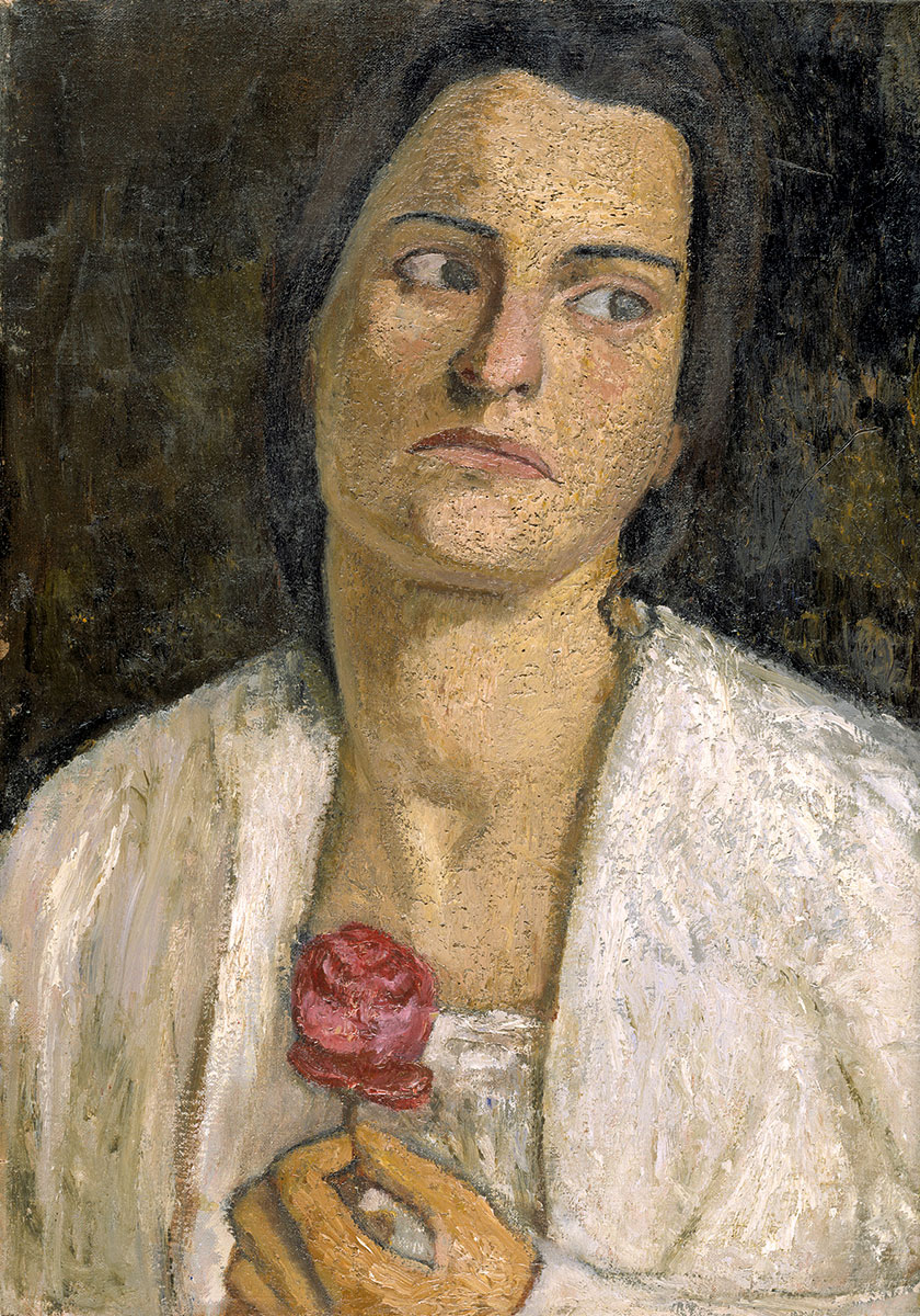 Die Bildhauerin Clara Rilke-Westhoff. 52 x 36,8 cm. Hamburger Kunsthalle